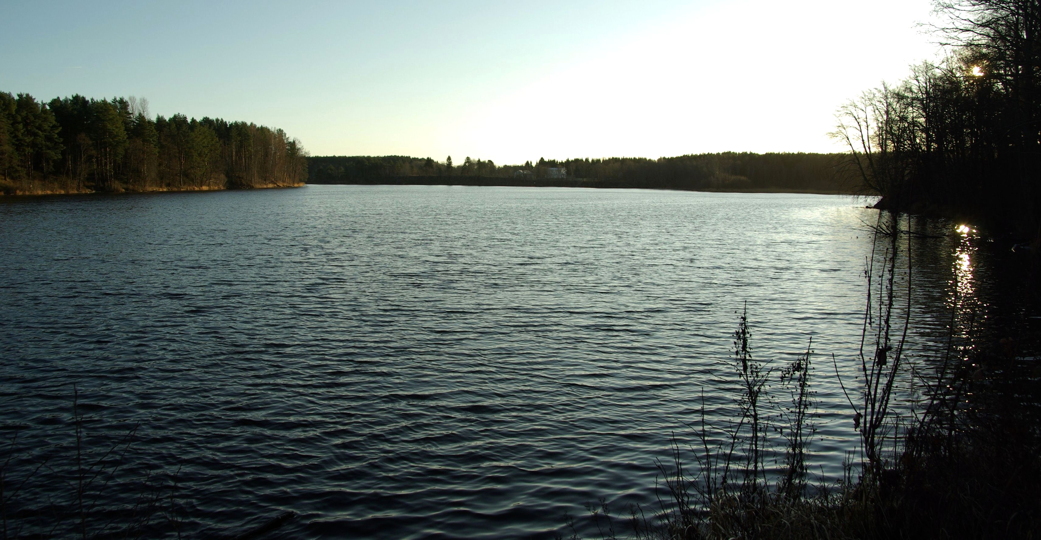 Linnamäe paisjärv Jägala jõel